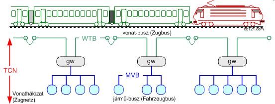 Az MVB és a WTB kapcsolata a TCN-en belül